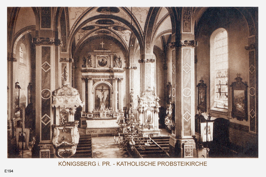 Im Innern der Propsteikirche in Königsberg